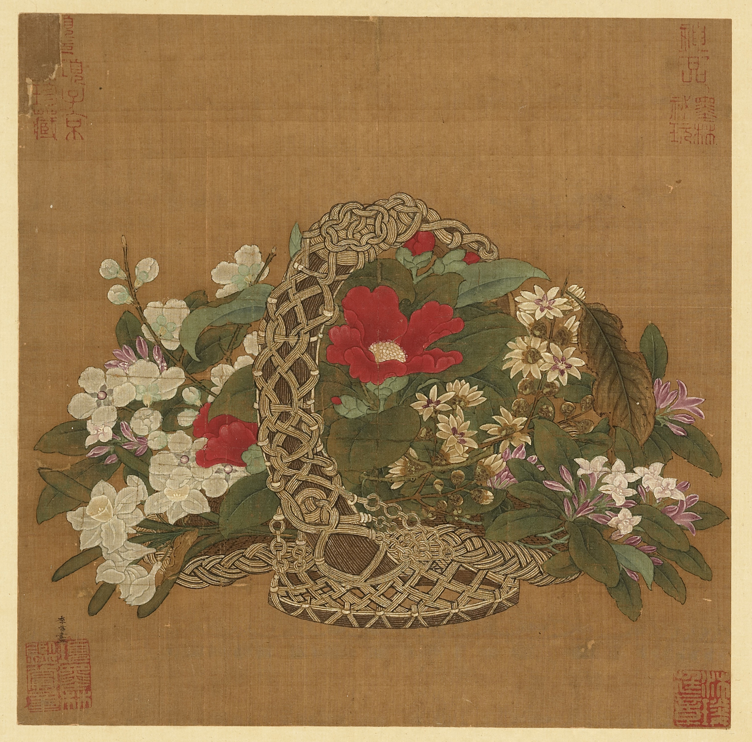 選自〈歷代集繪冊〉